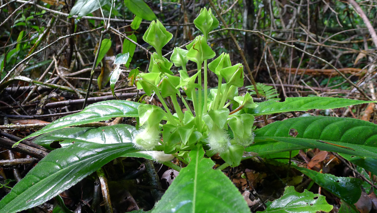 Sinningia barbata (Nees & Mart.) Nichols. Sinningia barbata